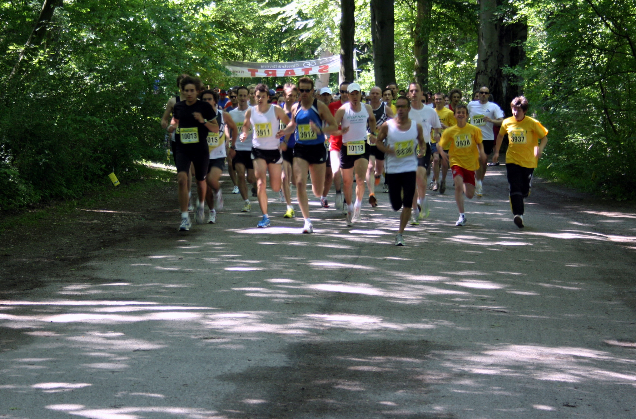 Münchner Kindllauf, 5000 und 10000 Meter. Start beim Biergarten im Englischen Garten, Hirschau.